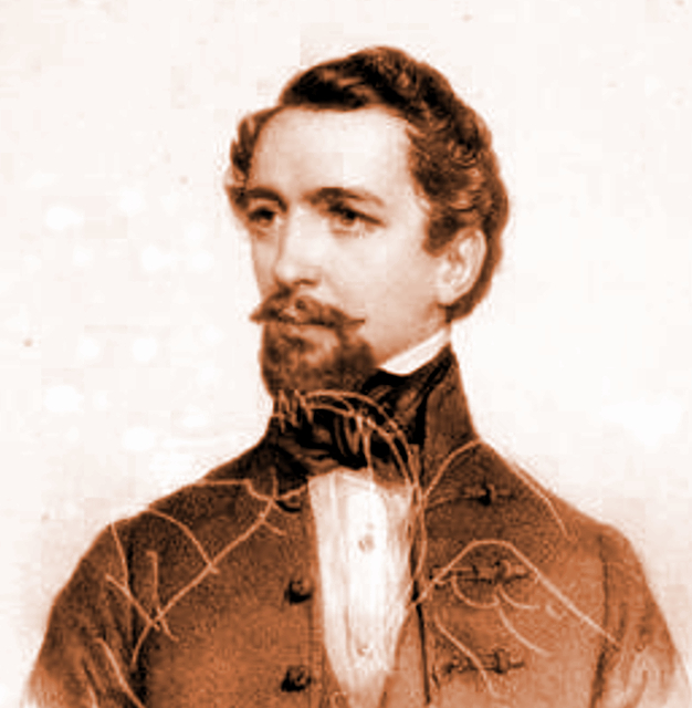 Czakó Zsigmond magyar színész, drámaíró